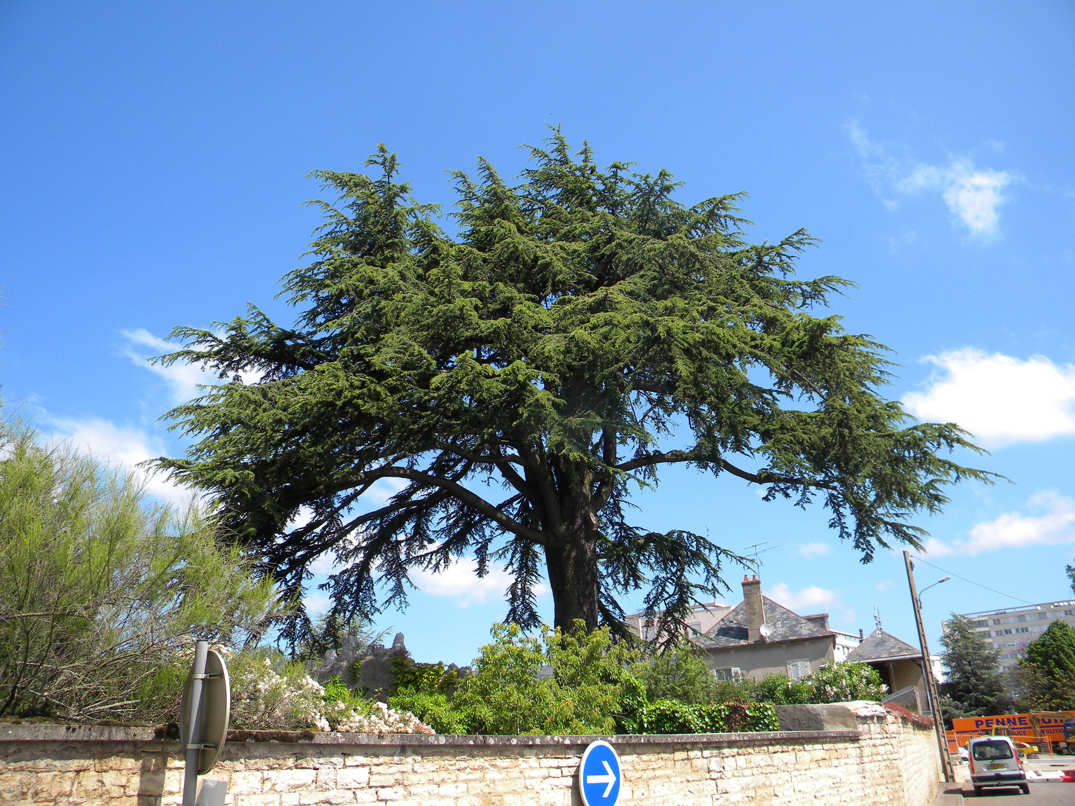 Lebanona cedro en Chenôve (Francio)